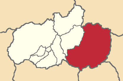 Mapa localizador del cantón en Tungurahua, Ecuador